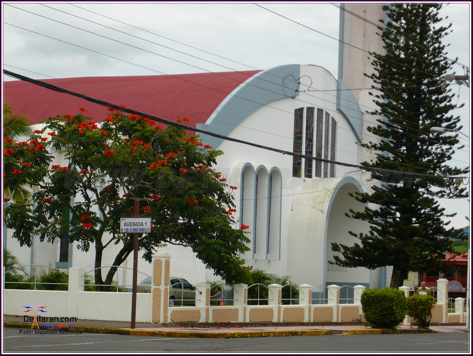 Vista Diagonal A La Escuela JMCM